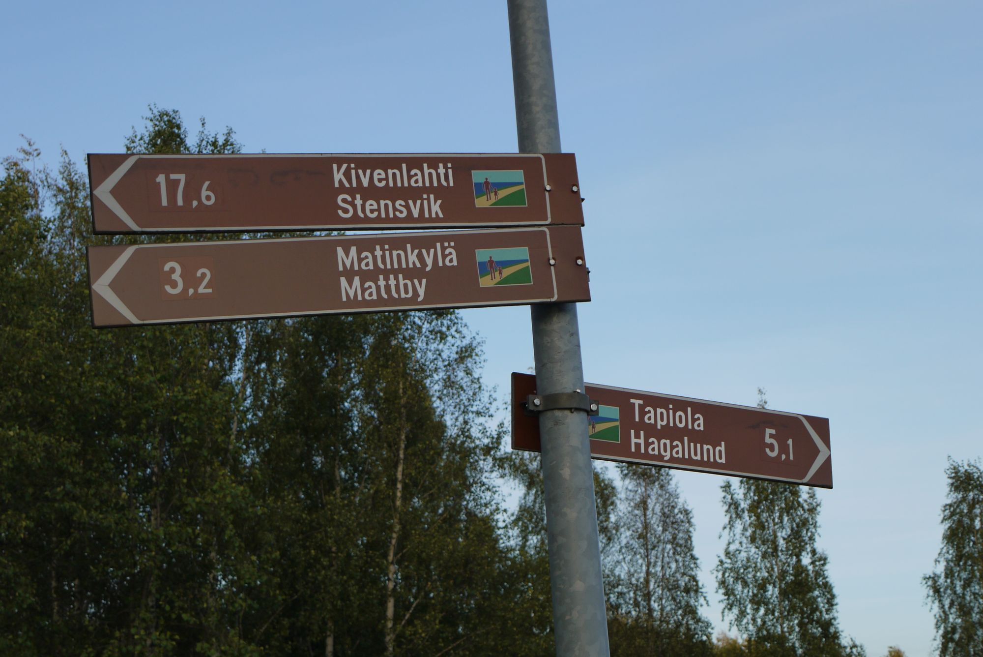 Espoon rantaraitin opasviitta Haukilahden satamassa